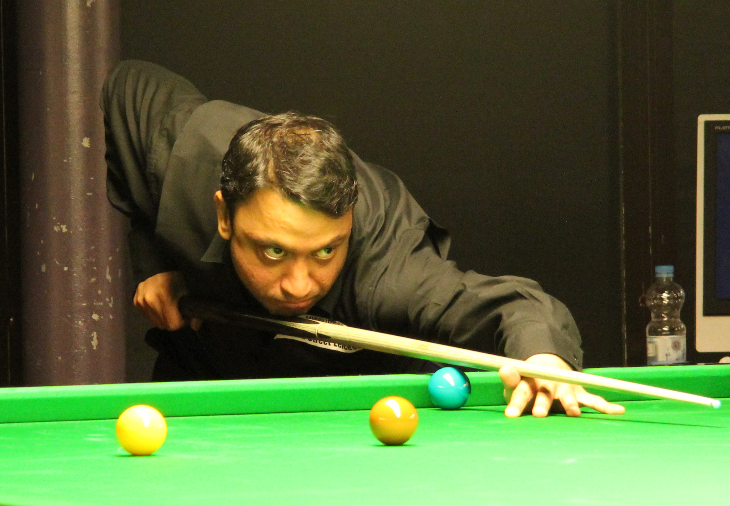 Joe Jogia beim Paul Hunter Classic 2011